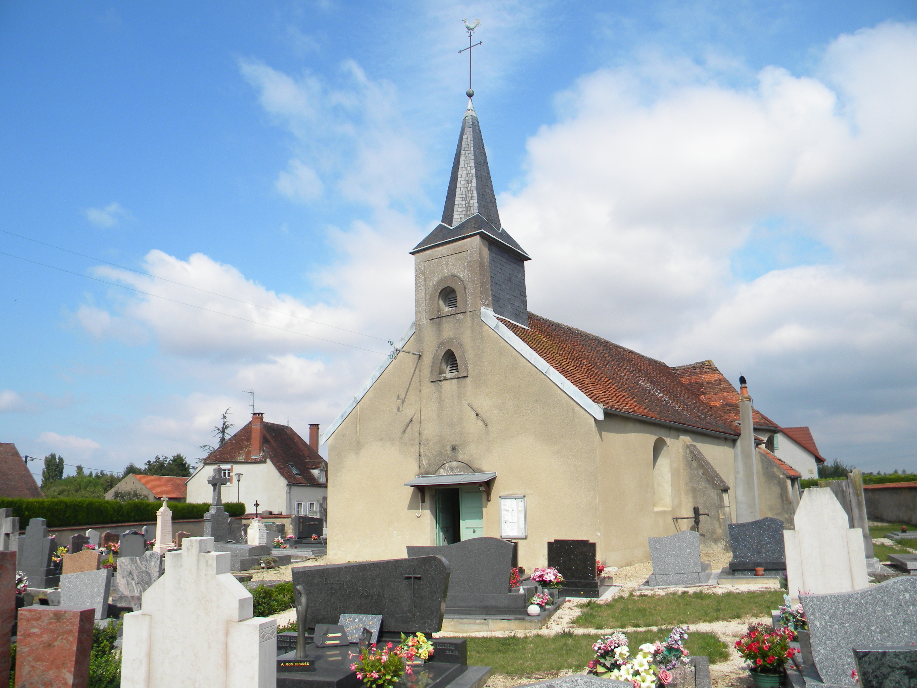 Eglise